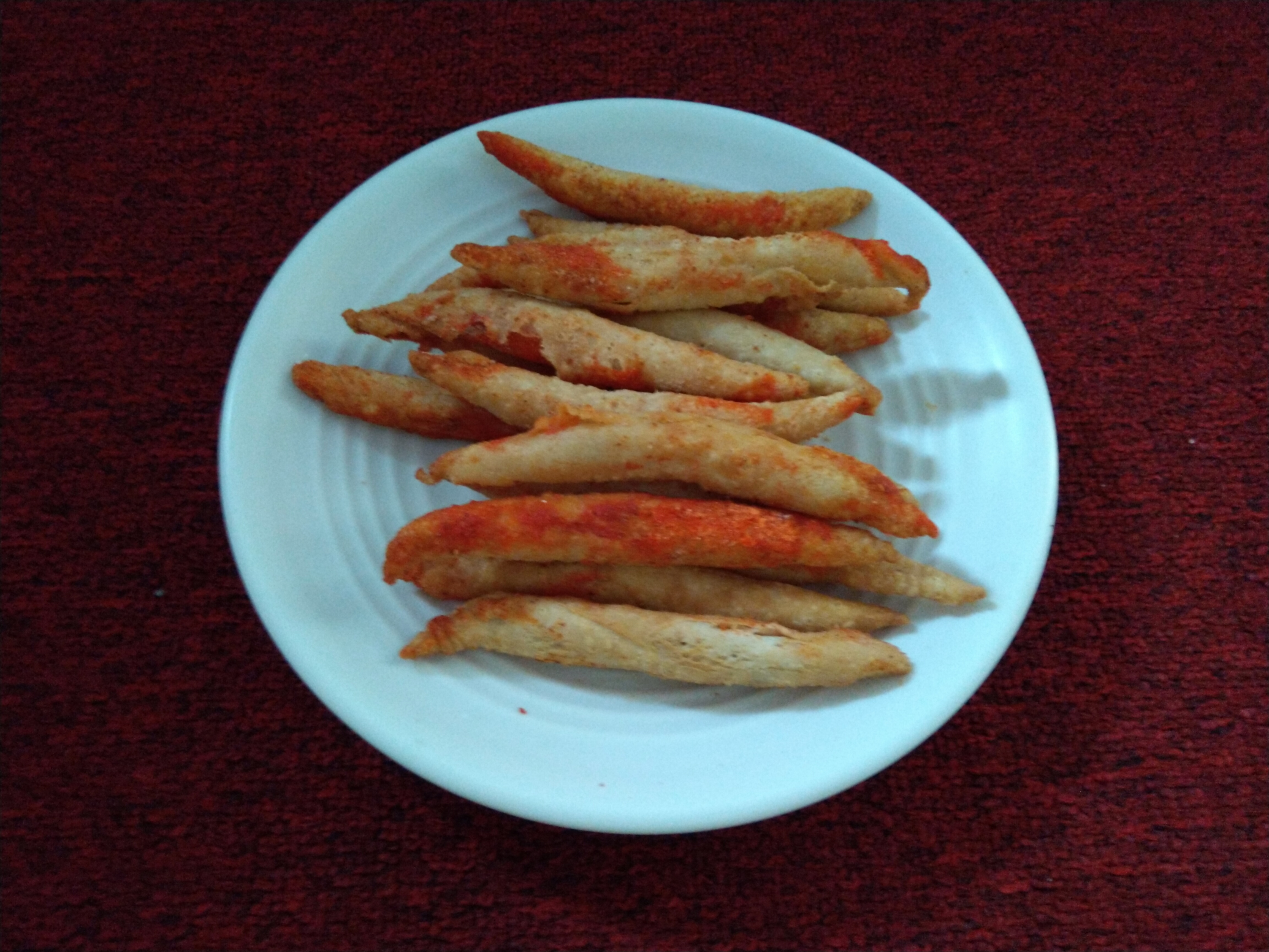 Jajanan sotong